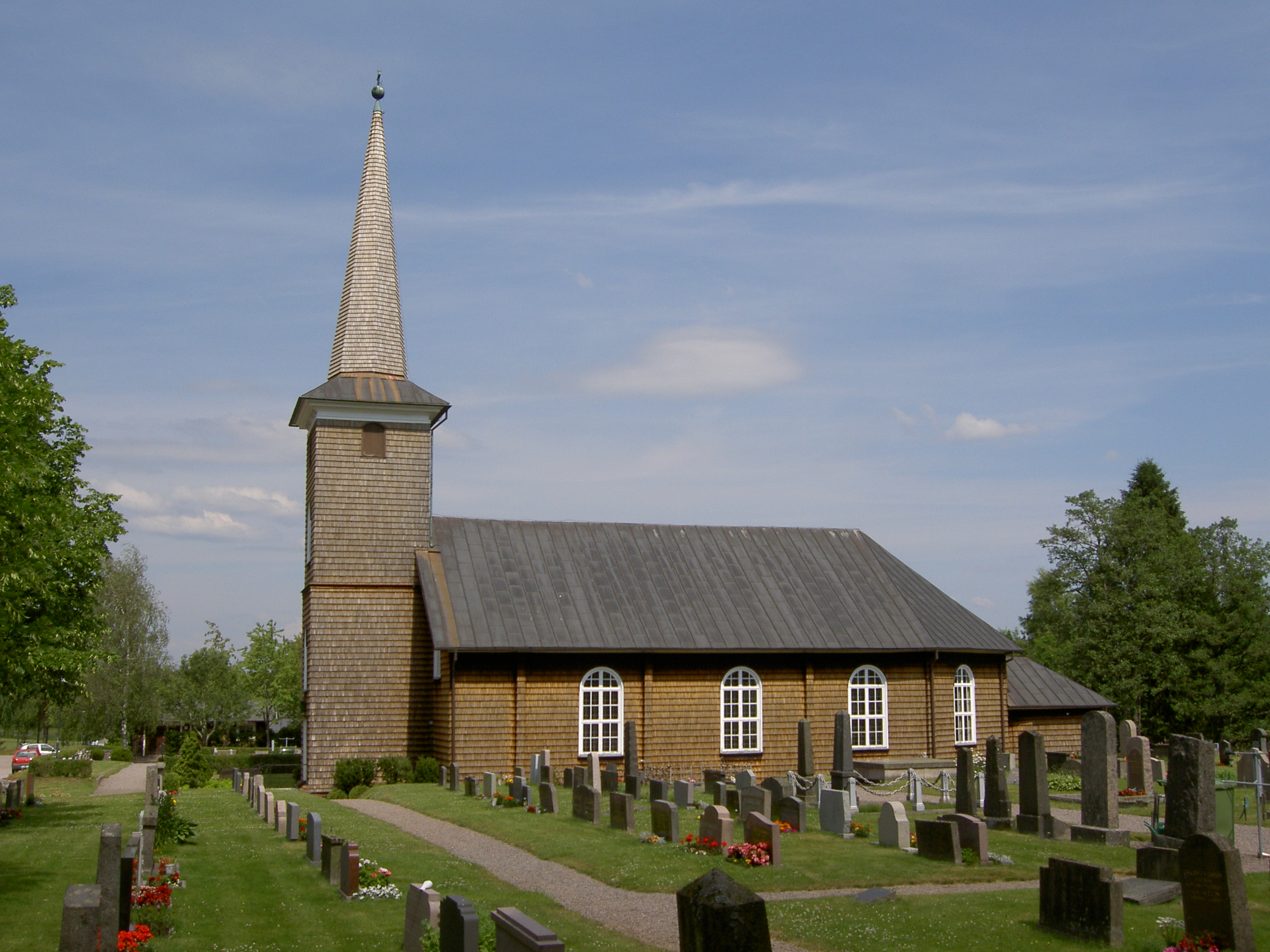 Tveta kyrka